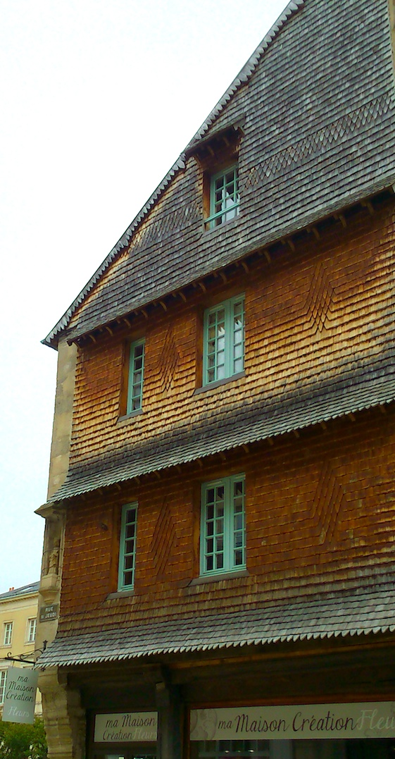 Façade recouverte de bardeaux de châtaigner, rue du jeudi à Alençon, Orne, basse-Normandie